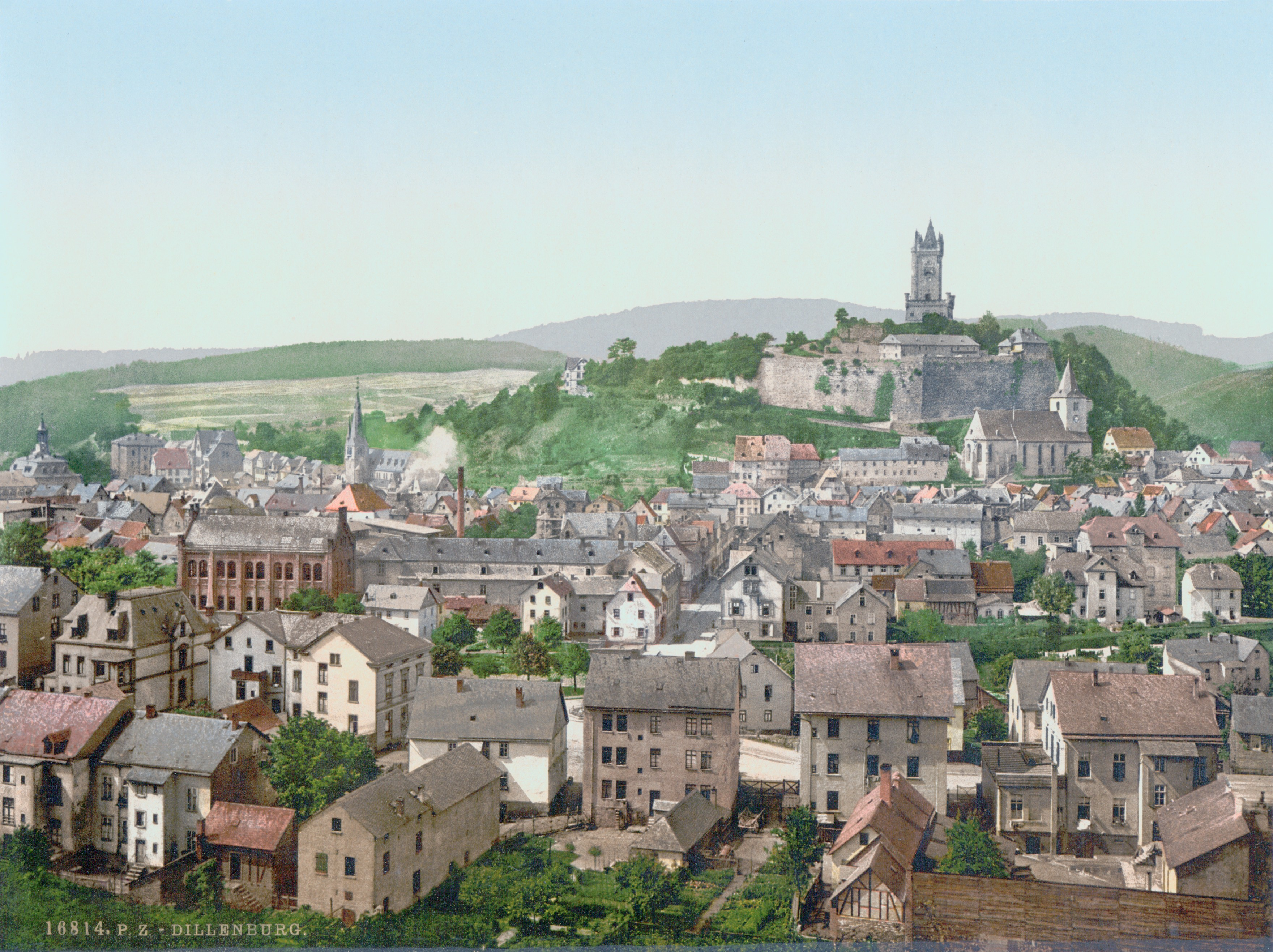 Dillenburg